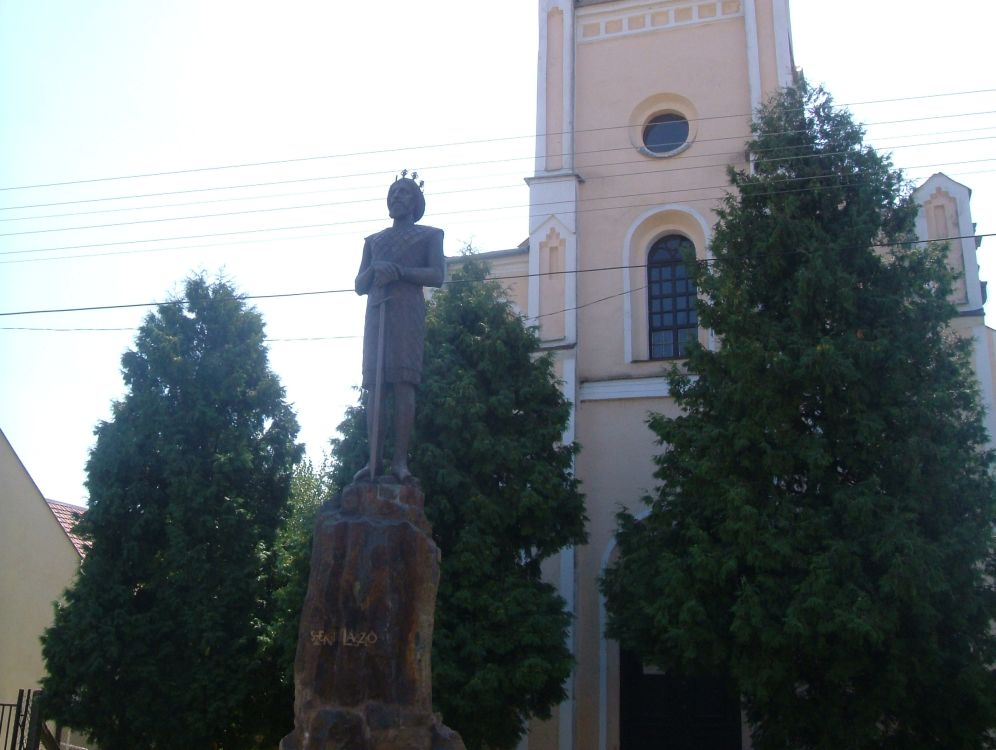 Szent László szobra Biharkeresztesen, háttérben a katolikus templom